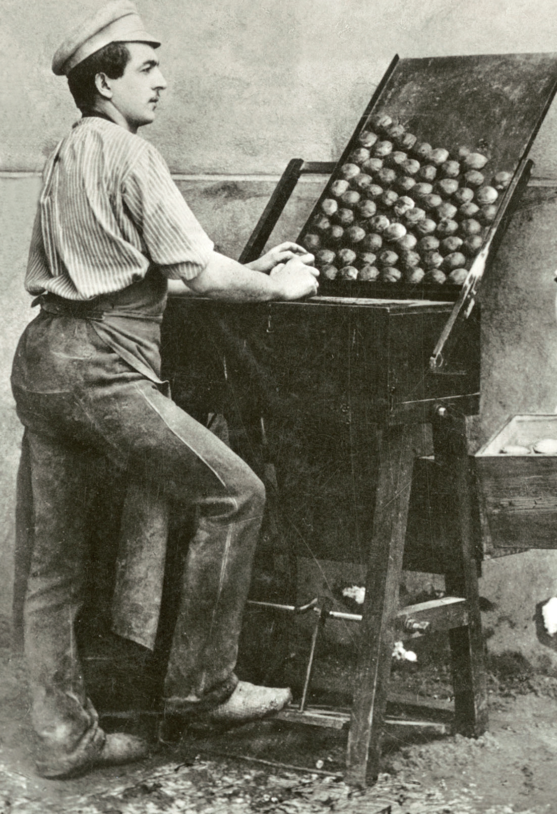 Ausschnitt aus einer Fotografie